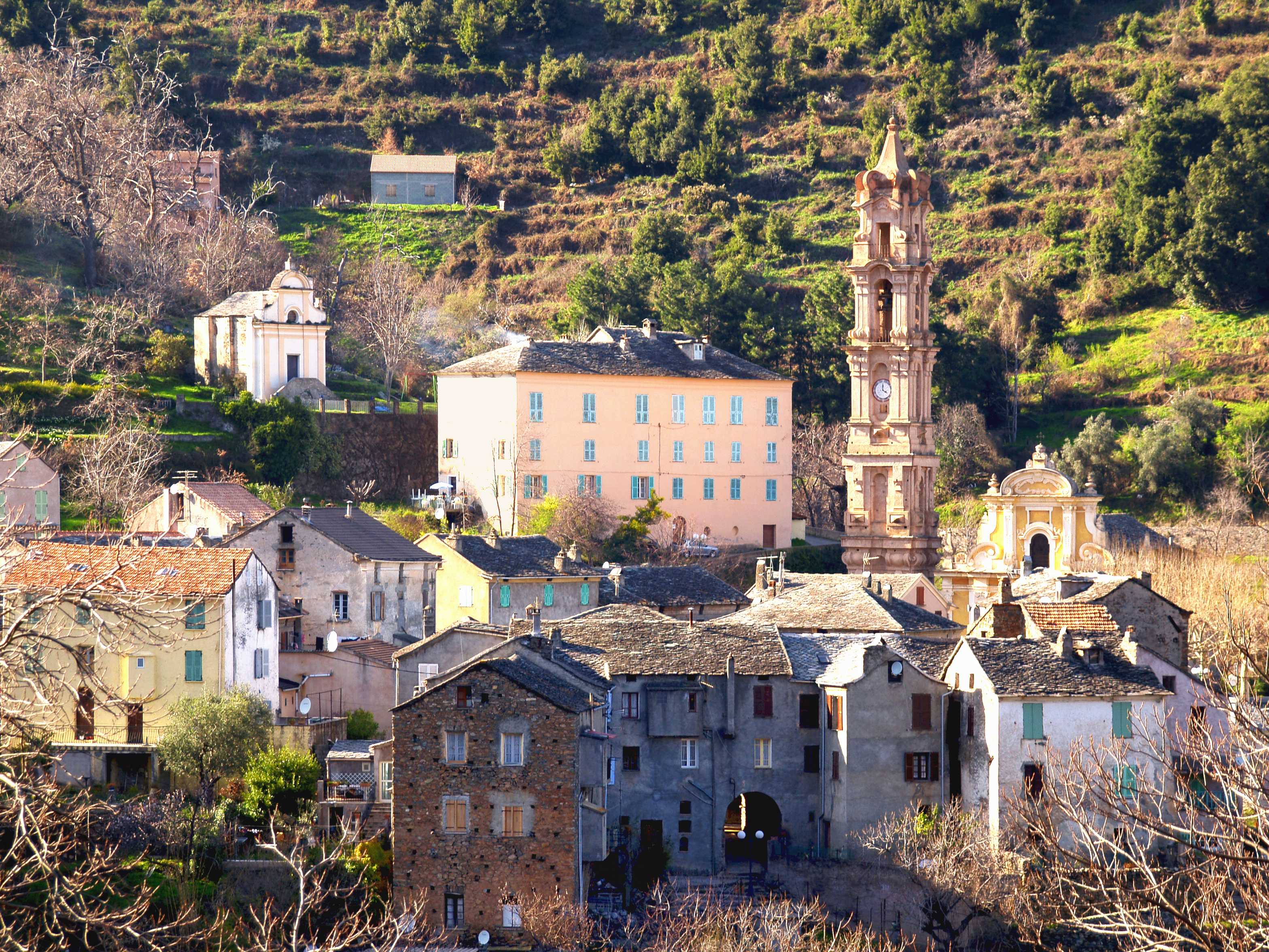 La Porta - Le village vu depuis la route de Ficaja